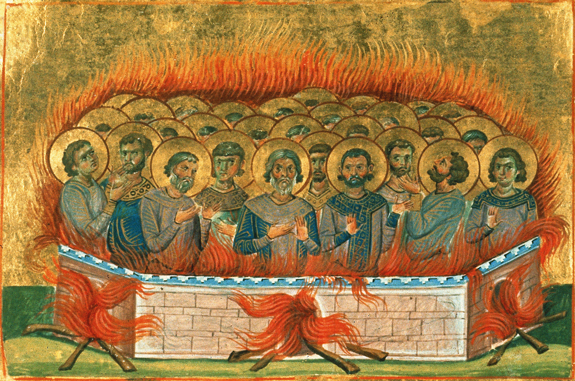 Мученики Евдоксий, Аттик и Агапий. Миниатюра из Минология Василия II. 976-1025 гг. (Vat. gr. 1613. P.156) // Atticus, Agapius, Eudoxius,. Carterius, Istucarius (Styrax), Pactobius. (Tobias) , & Nictopolion, & their Companions, MM. In Syria, at Cyrrhus